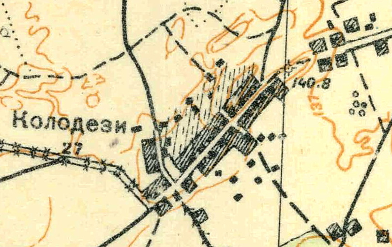 Топографическая карта Ленинградской области, квадрат О-35-24-А-г (Горки), деревня Колодези